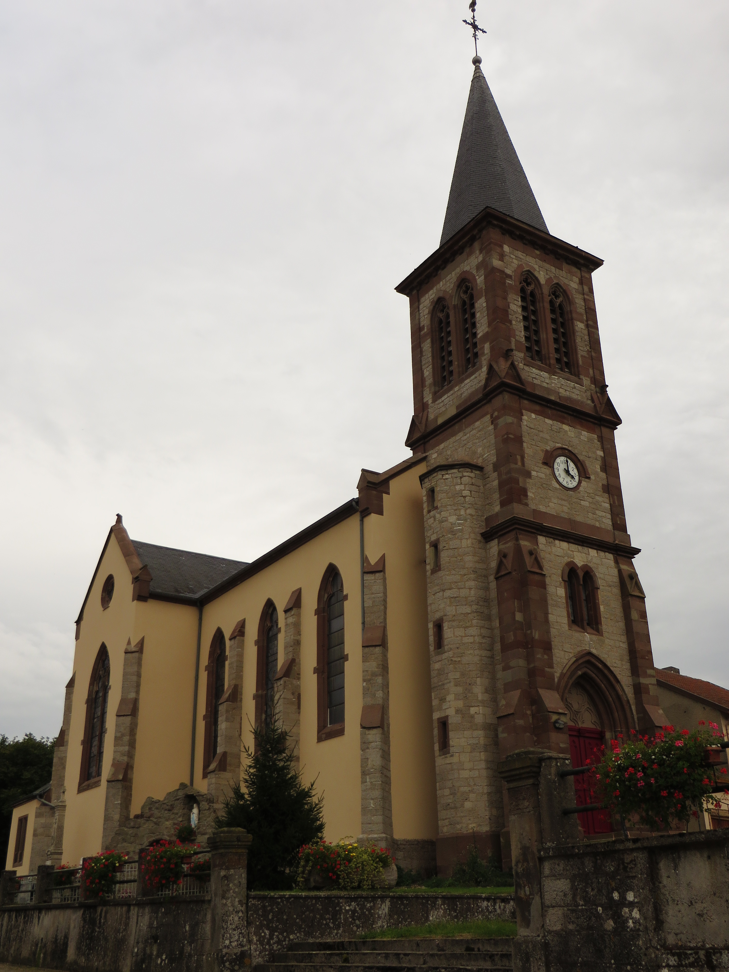 Rening eglise